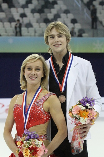 Пернель Каррон и Ллойд Джонс с бронзовыми медалями Кубка Китая 2011